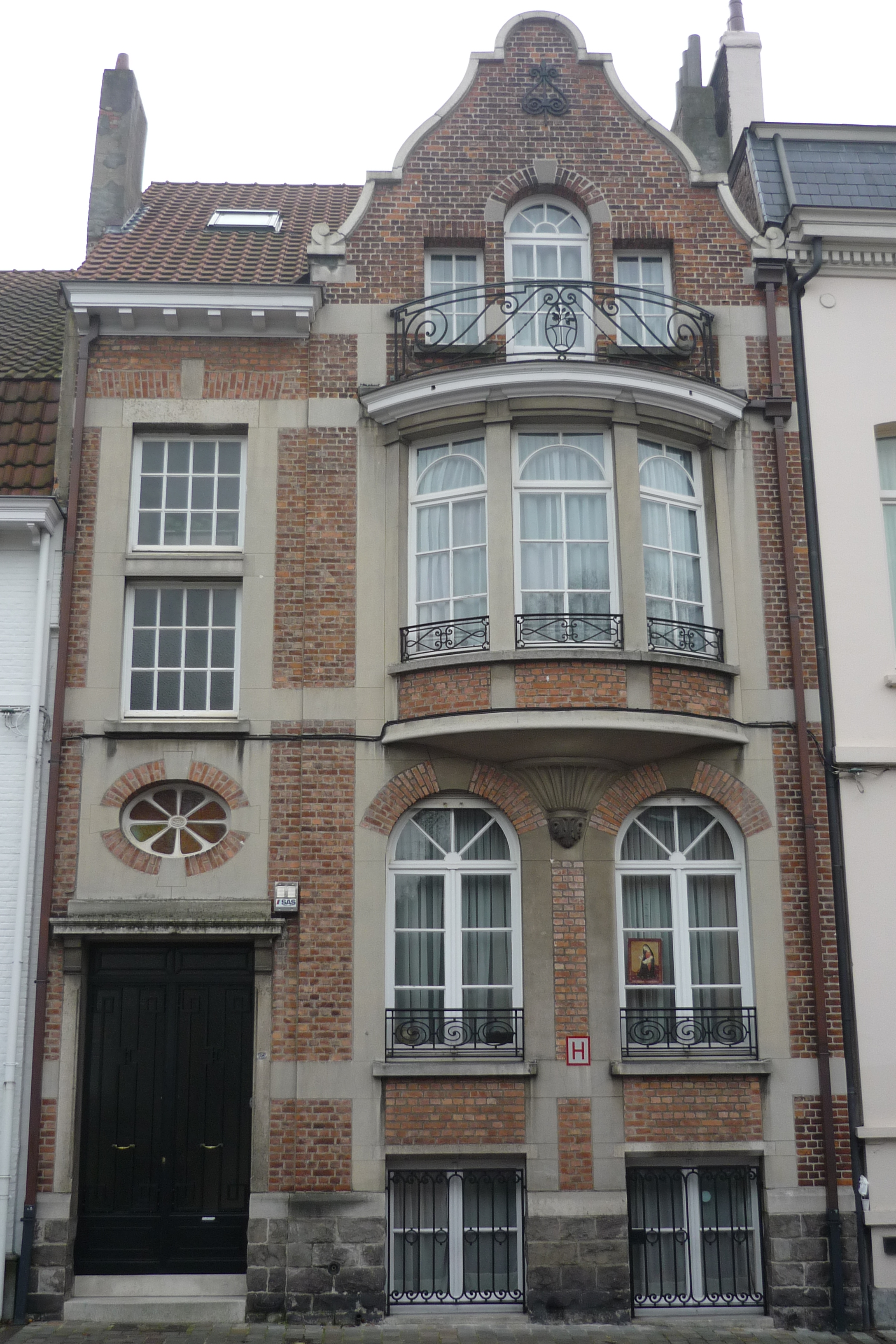 Maison personnelle de l'architecte et ingénieur bruxellois EUGENE VAN DIEVOET située à Woluwe-Saint-Lambert rue Vergote, 20 (anciennement n° 14), maison bourgeoise de style éclectique d'inspiration Beaux-Arts , construite en 1923.